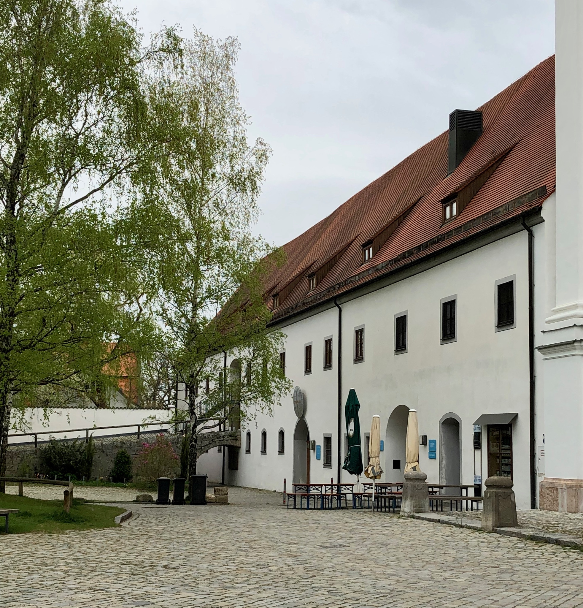 Ehemaliger Marstall mit Traidböden: jetzt Winterkirche St. Stephan, Café, Versammlungsraum und Ausstellungsraum, stattlicher zweigeschossiger Steilsatteldachbau, errichtet 1627, im Süden verkürzt 1720, teilweise modern umgebaut; mit Ausstattung